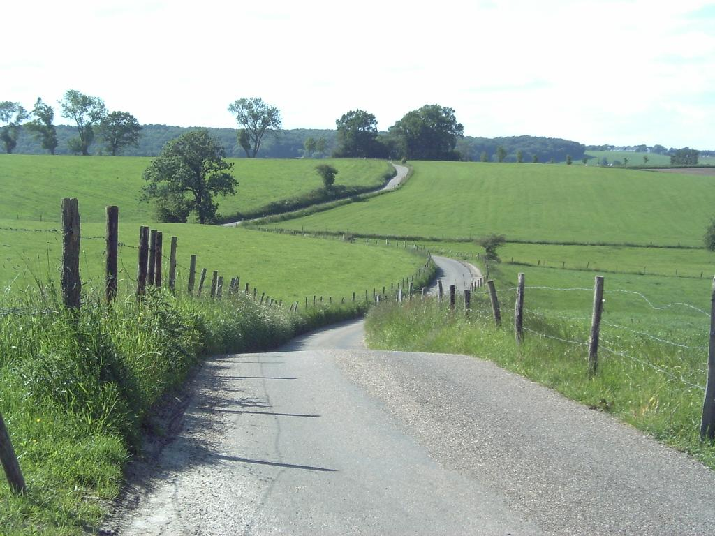 Limburgs: Sjlingerweeg vanoet Klein-Kuttinge